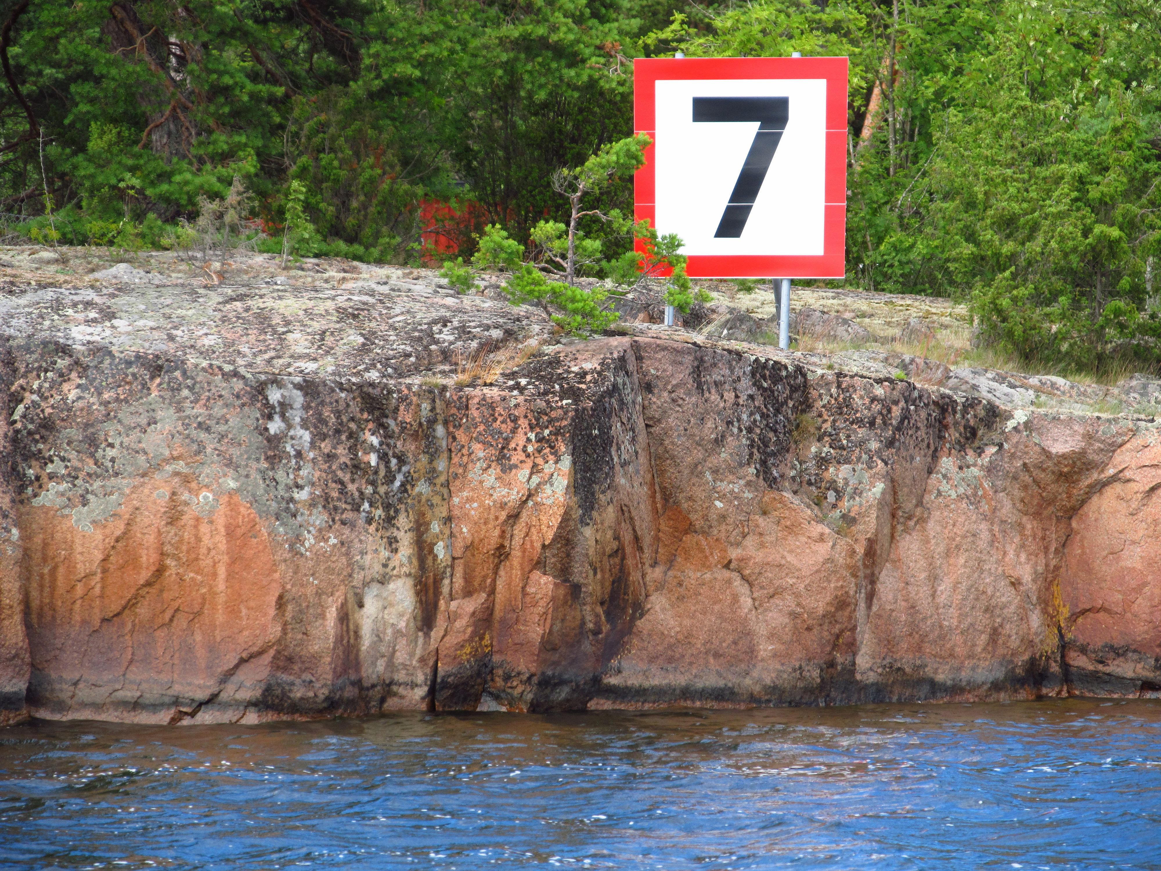 Fartbegränsingsskylt i Oskarshamns södra skärgård.